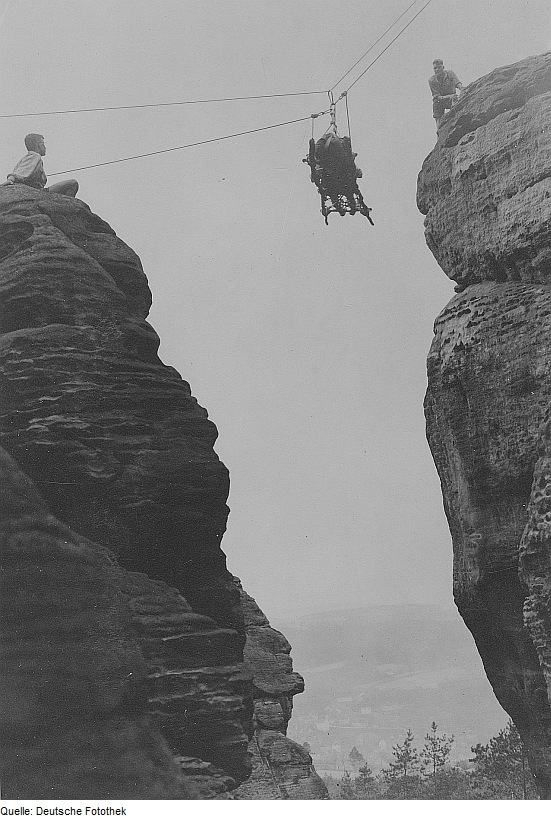 Original image description from the Deutsche Fotothek Bergung eines Verletzten mittels selbst gefertigter Trage